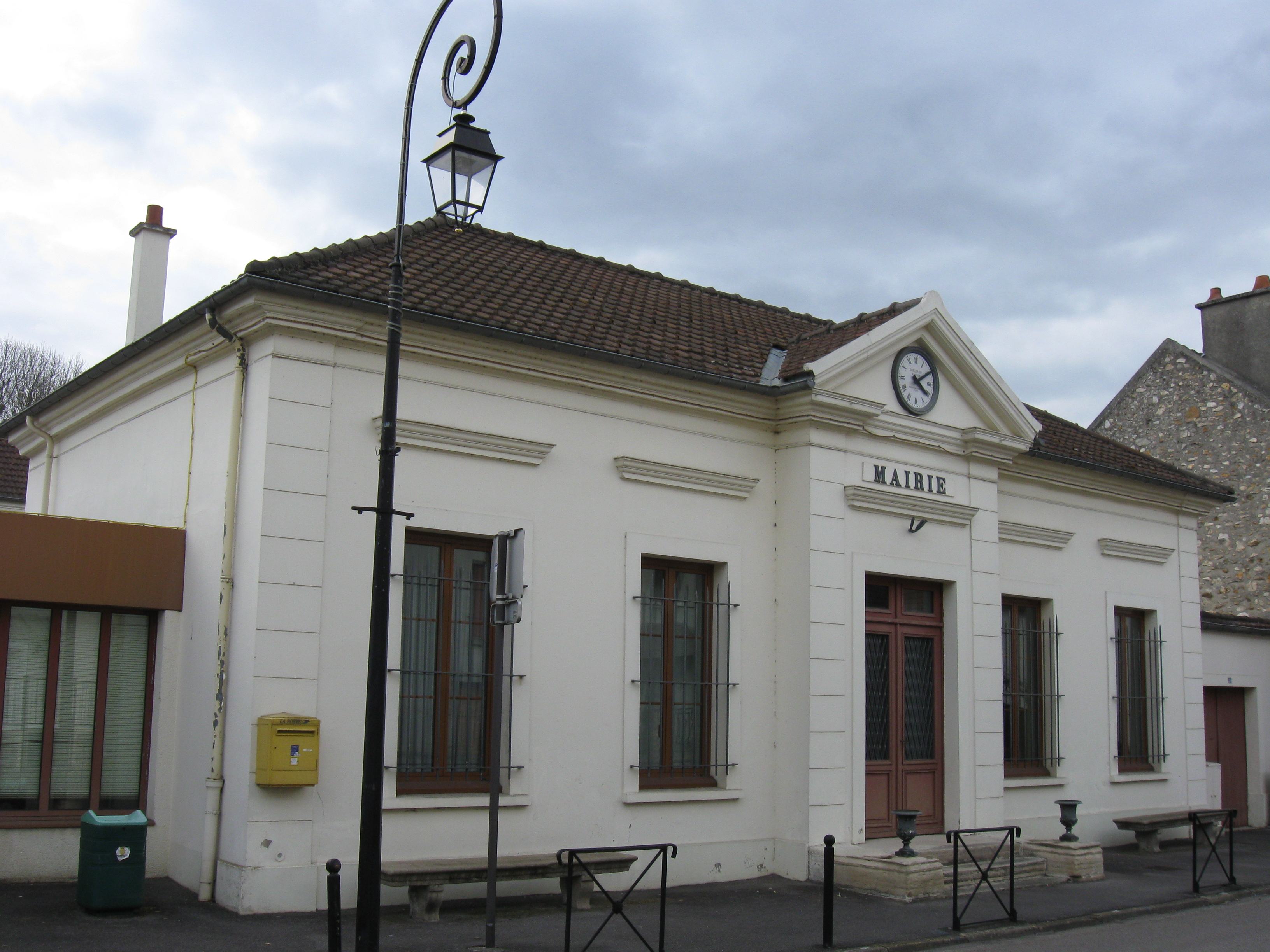 Mairie de Croissy-Beaubourg. (Seine-et-Marne, région Île-de-France).